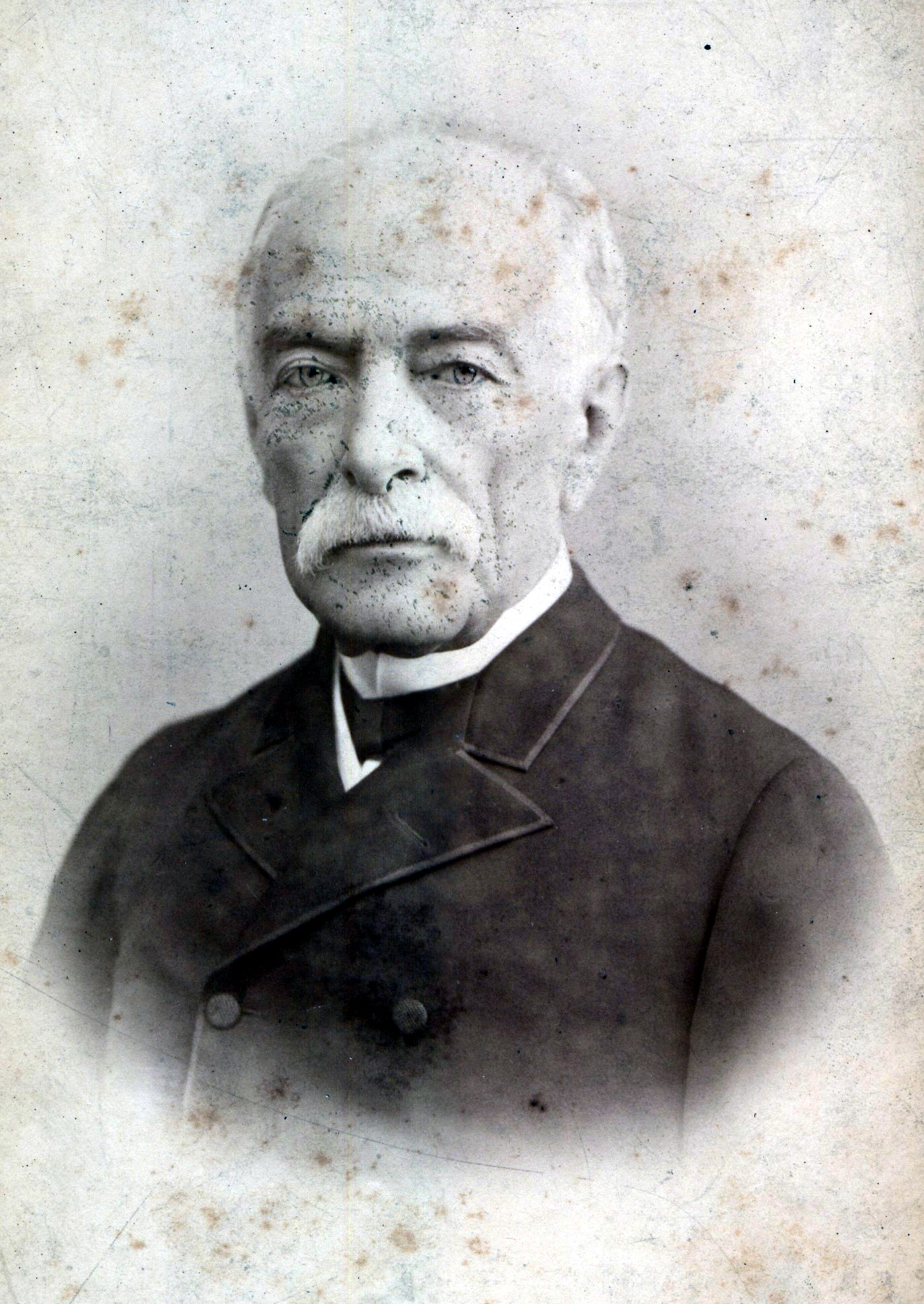 Ernest Malinowski, ok. 1890 r.